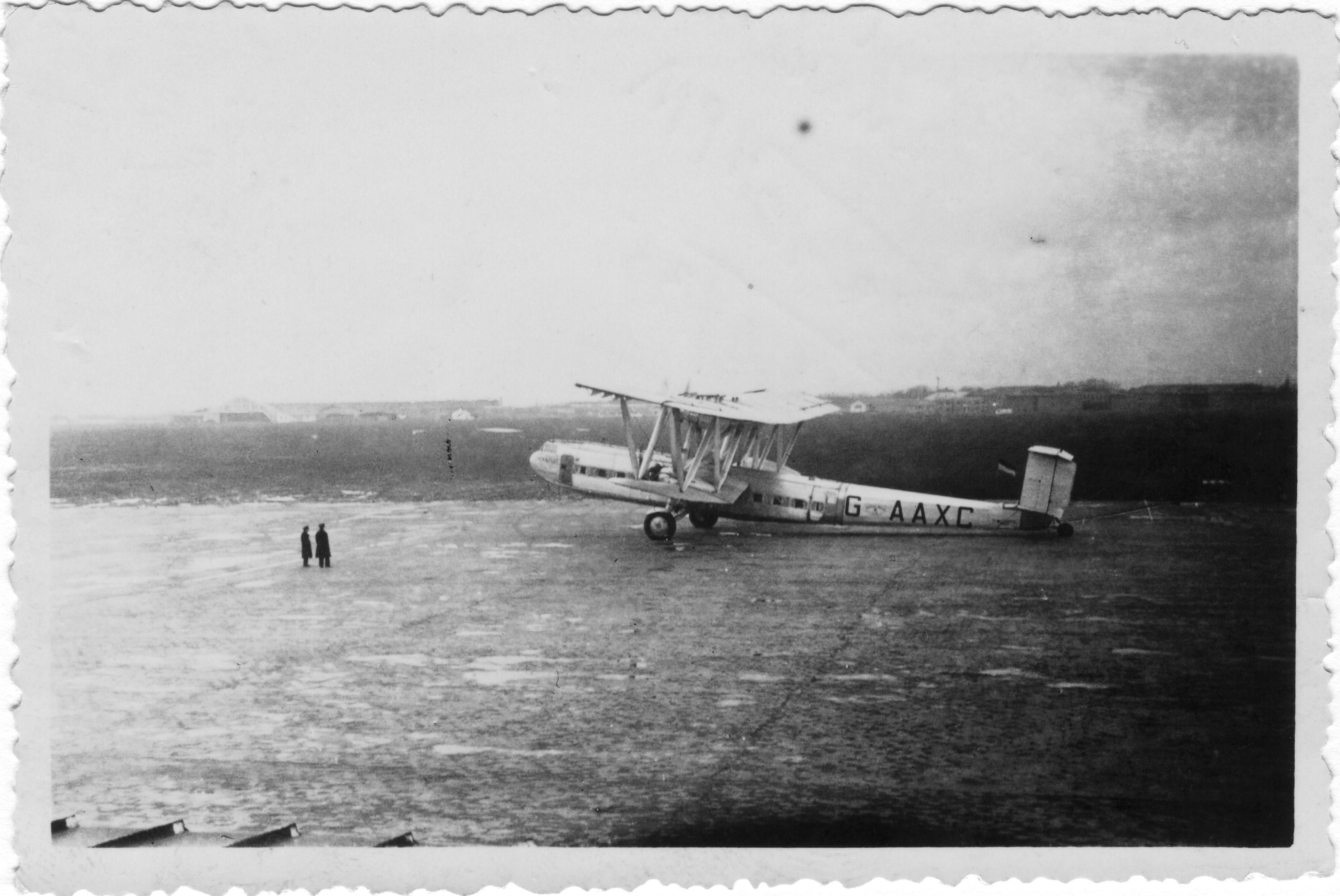 Départ de l'avion HP 45 G-AXXC Heracles de l' Imperial Airways à l' aéroport du Bourget. Le HP 45 (HP 42W) était un aéronef long-courrier biplan quadrimoteur construit en 1931 par l' entreprise de fabrication d' avions britanique Handley Page. Il fut utilisé pour les liaisons aériennes en Europe (comme les 3 autres exemplaires du modèle HP 45 plus connus sous la dénomination de HP 42 W (W pour "Western" c' est-à-dire "Europe", le HP 45 est le jumeau pour l' Europe du HP 42 - HP 42E - destiné, lui, aux vols longues distances vers l' Asie). Photographie prise depuis la terrasse du bar. Le Bourget (Aéroport du Bourget), Seine-Saint-Denis, France.